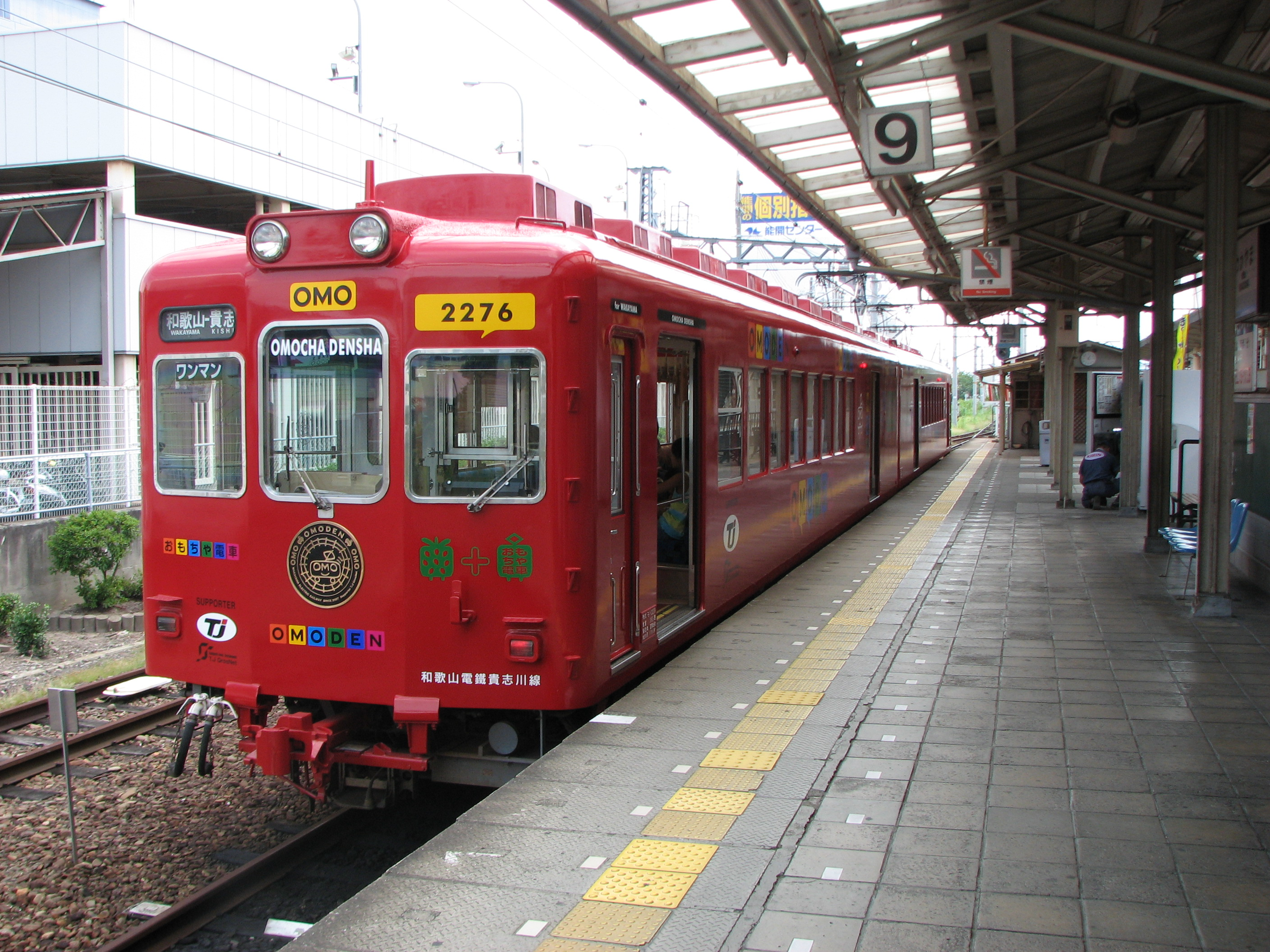 和歌山電鐡2270系おもちゃ電車（喜志川線和歌山駅にて撮影）